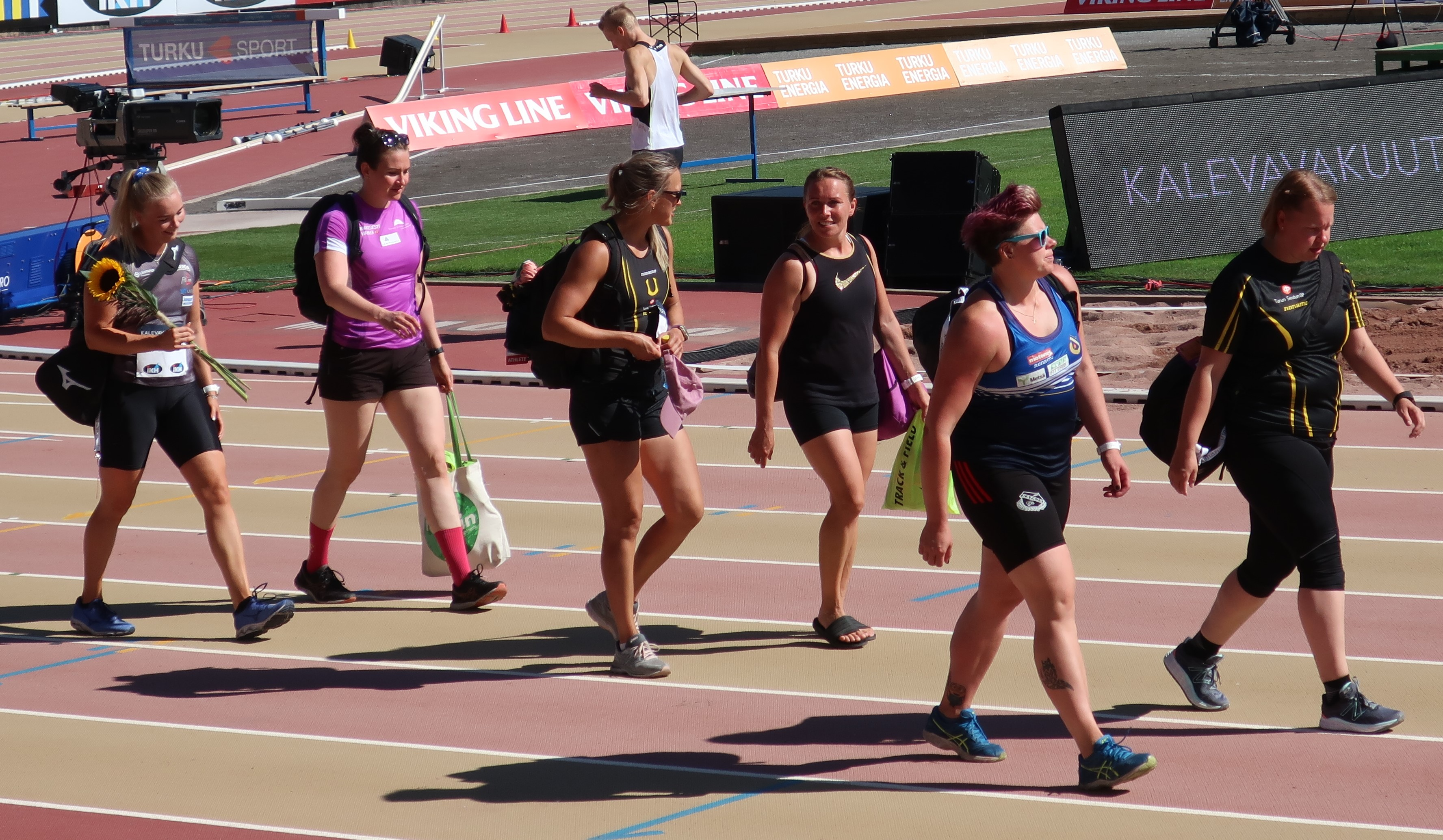 Naisten kiekonheiton loppukilpailun osallistujia kilpailun jälkeen Kalevan kisoissa 2020. Vasemmalla voittaja Salla Sipponen ja toinen vasemmalta hopeamitalisti Sanna Kämäräinen.